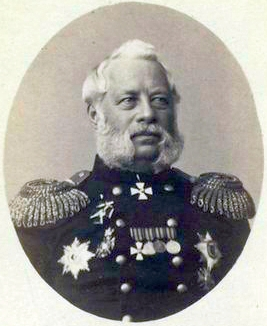 Панфилов, Александр Иванович